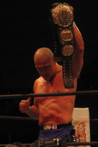 2012年6月16日 大阪府立体育会館 「DOMINION6.16」 ロウ・キー